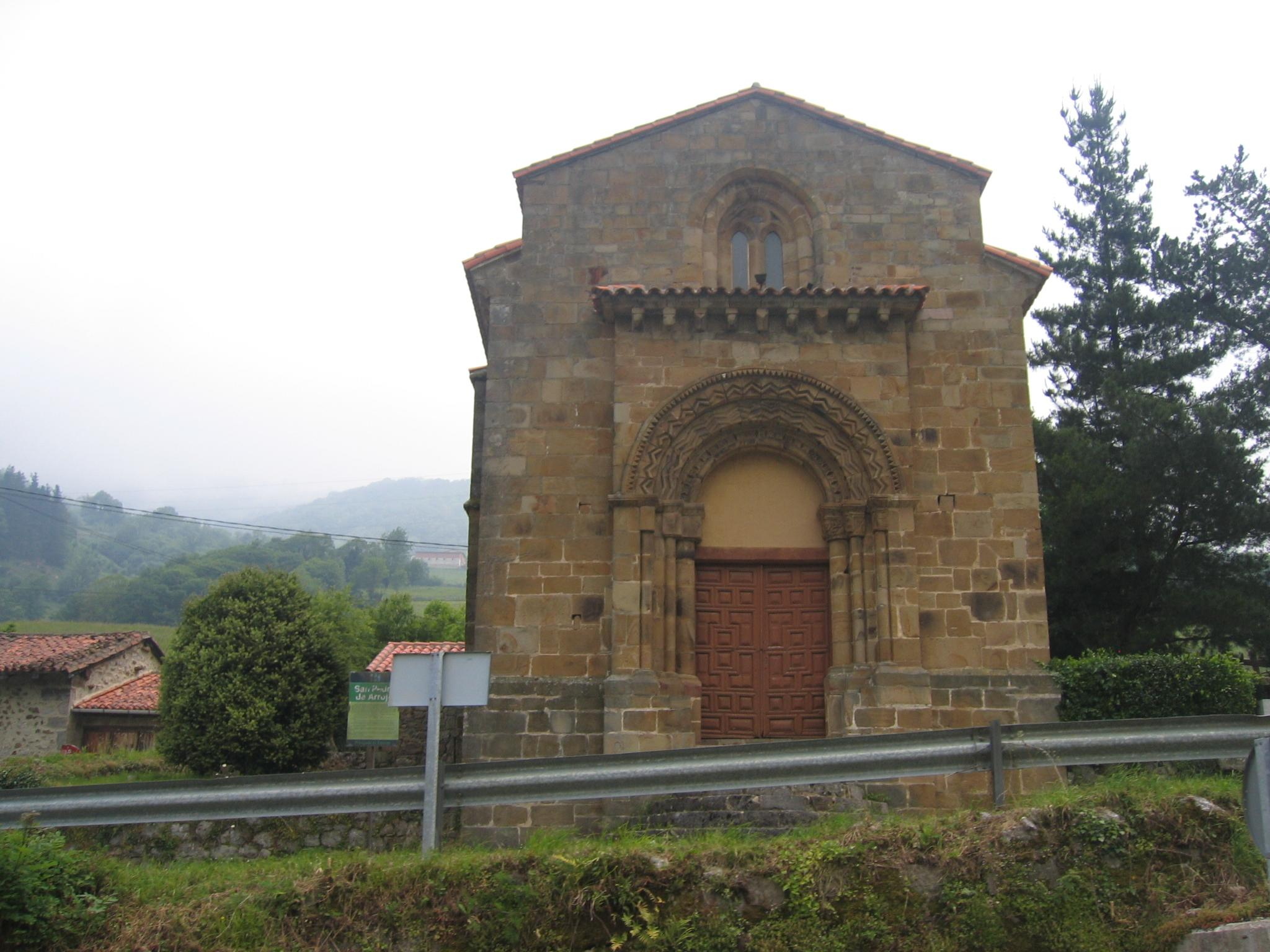 Fotografía del Iglesia de San Pedro de Arrojo en el concejo de Quirós.